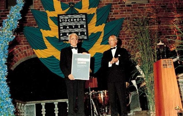 Prof. Dagan receives the Stockholm Water Prize